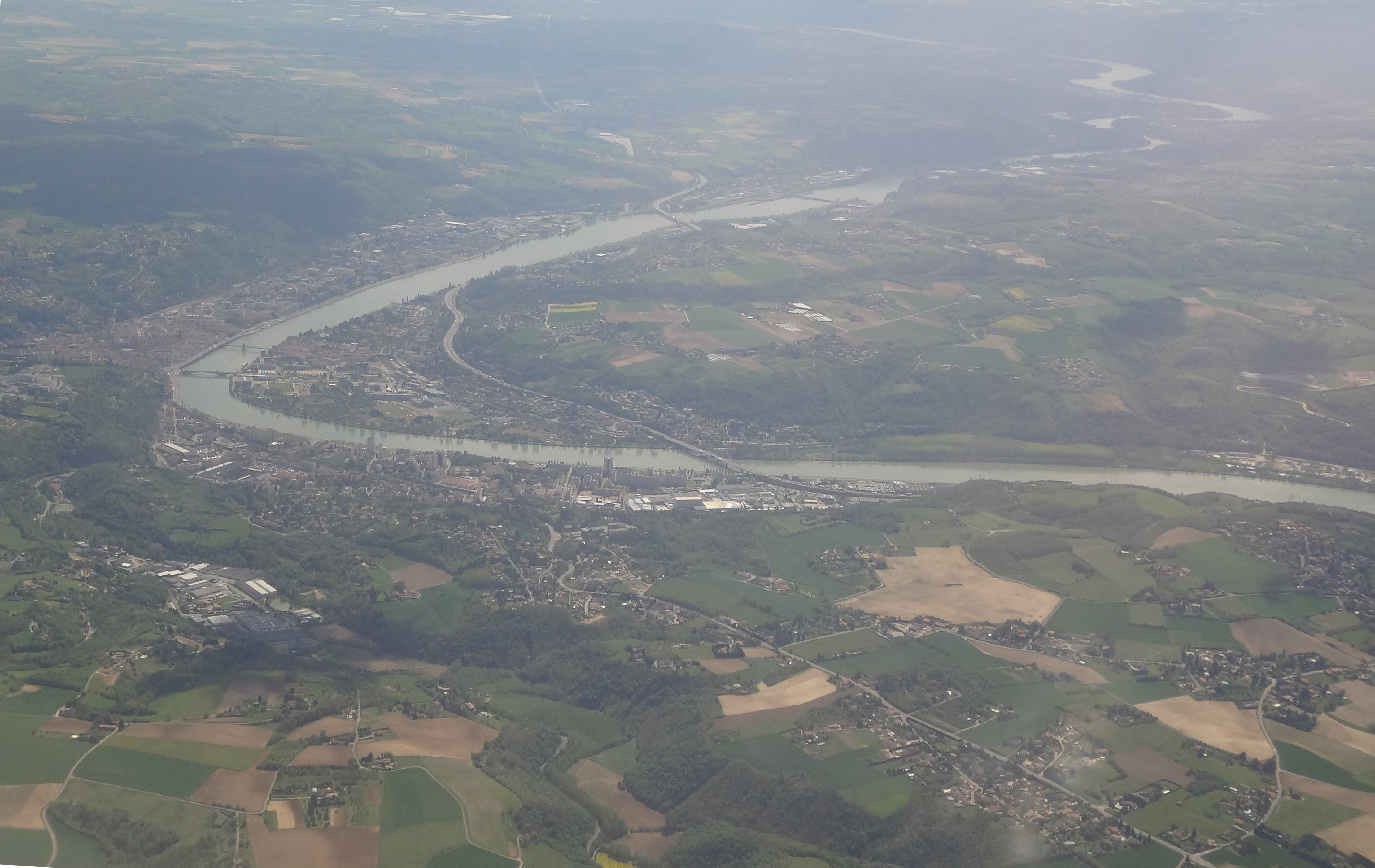 Vue aerienne de Vienne (France)